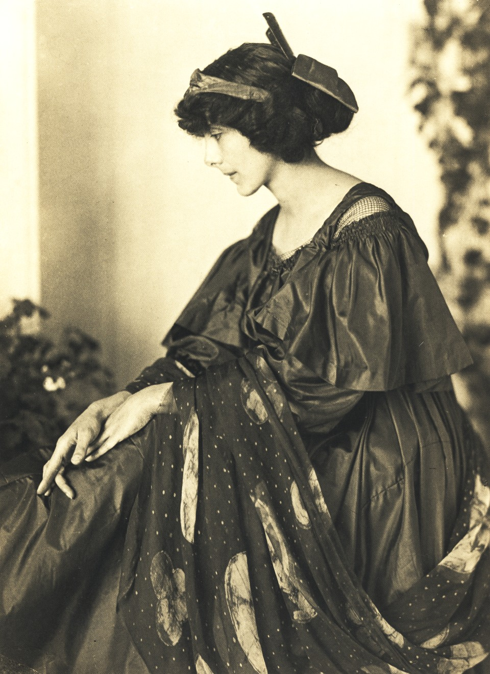 Porträt der Modedesidnerin Anna Muthesius.